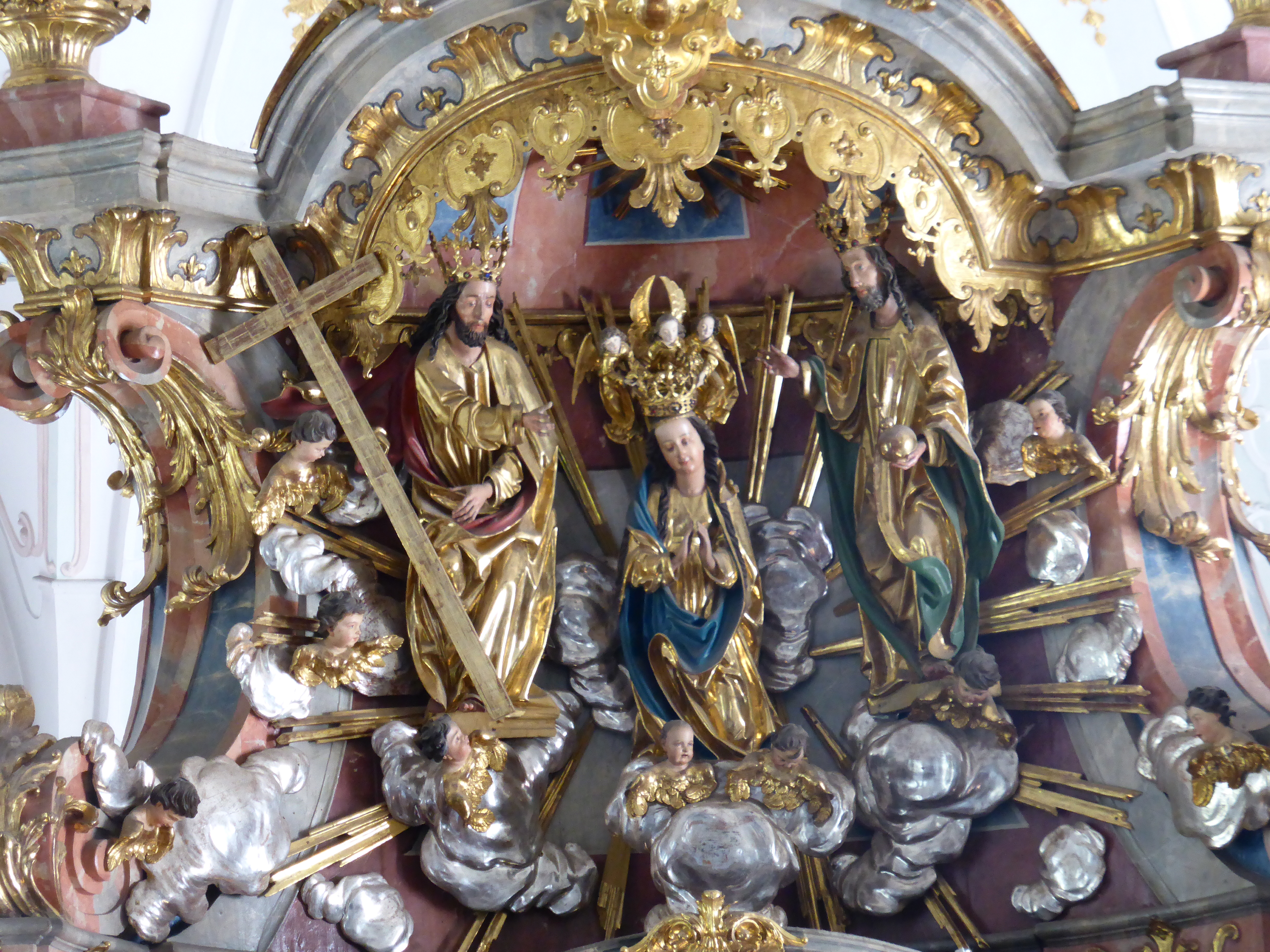 Sekundärer Kultgegenstand: Dreifaltigkeitsgruppe, Skulptur mit Krönung Marias im Aufsatz des Hochaltares. Anscheinend gehörte diese Gruppe zum Bildprogramm des Flügelaltares von 1499